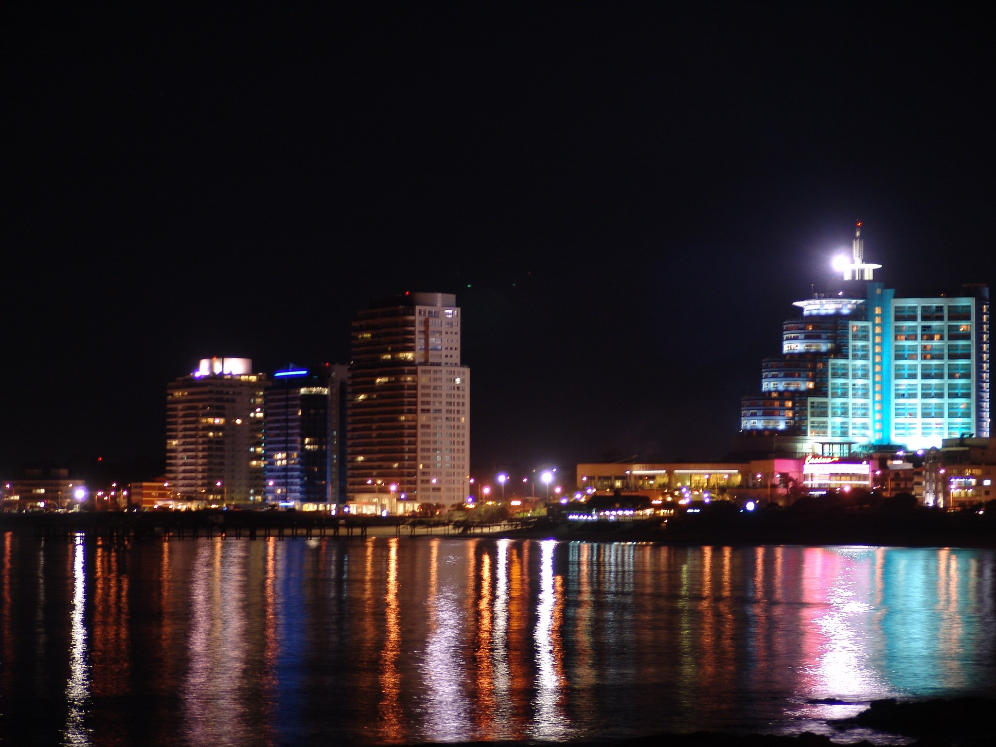 Punta del Este (Uruguay)